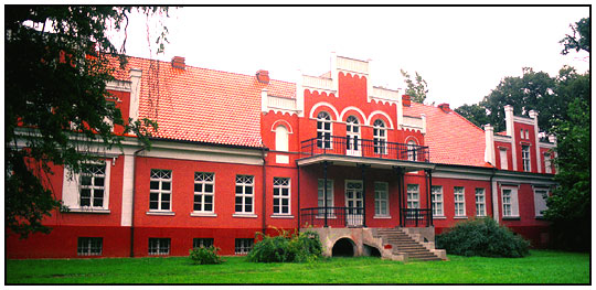 Òpisënk Wejrowò (in